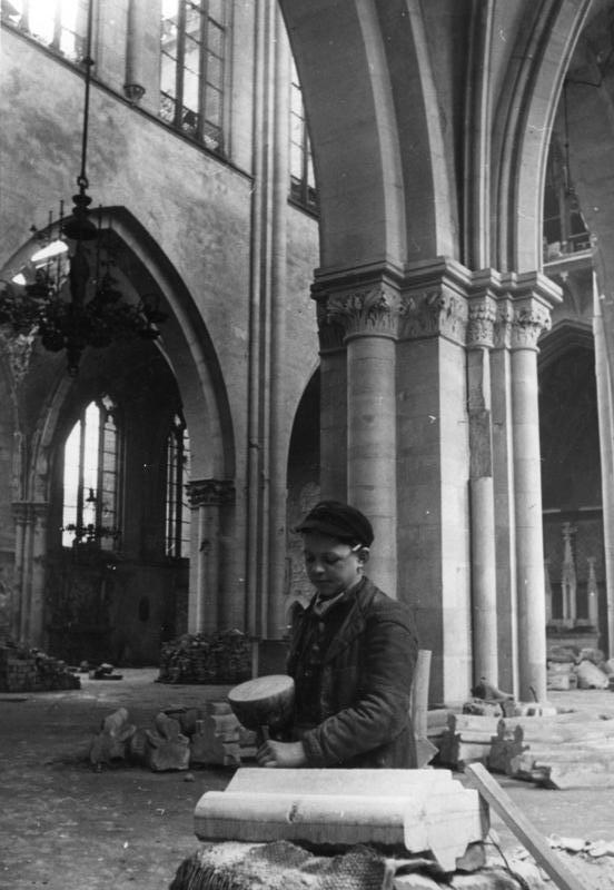 Magdeburg, Steinmetzarbeit im Dom Reparaturarbeiten im Magdeburger Dom. Der jüngste Steinmetz bei der Arbeit Aufnahme: Cürlis 1166-48